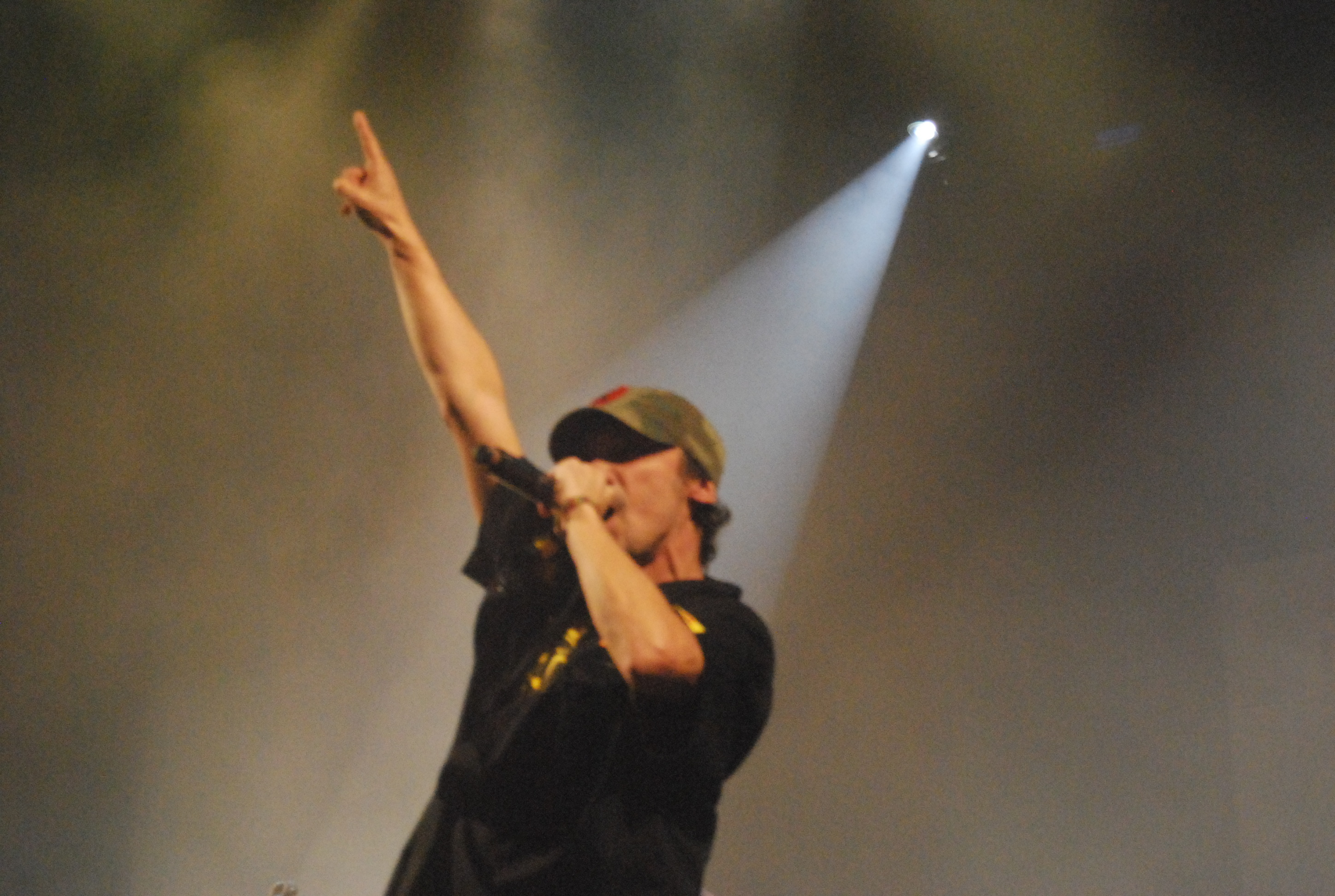 Manu